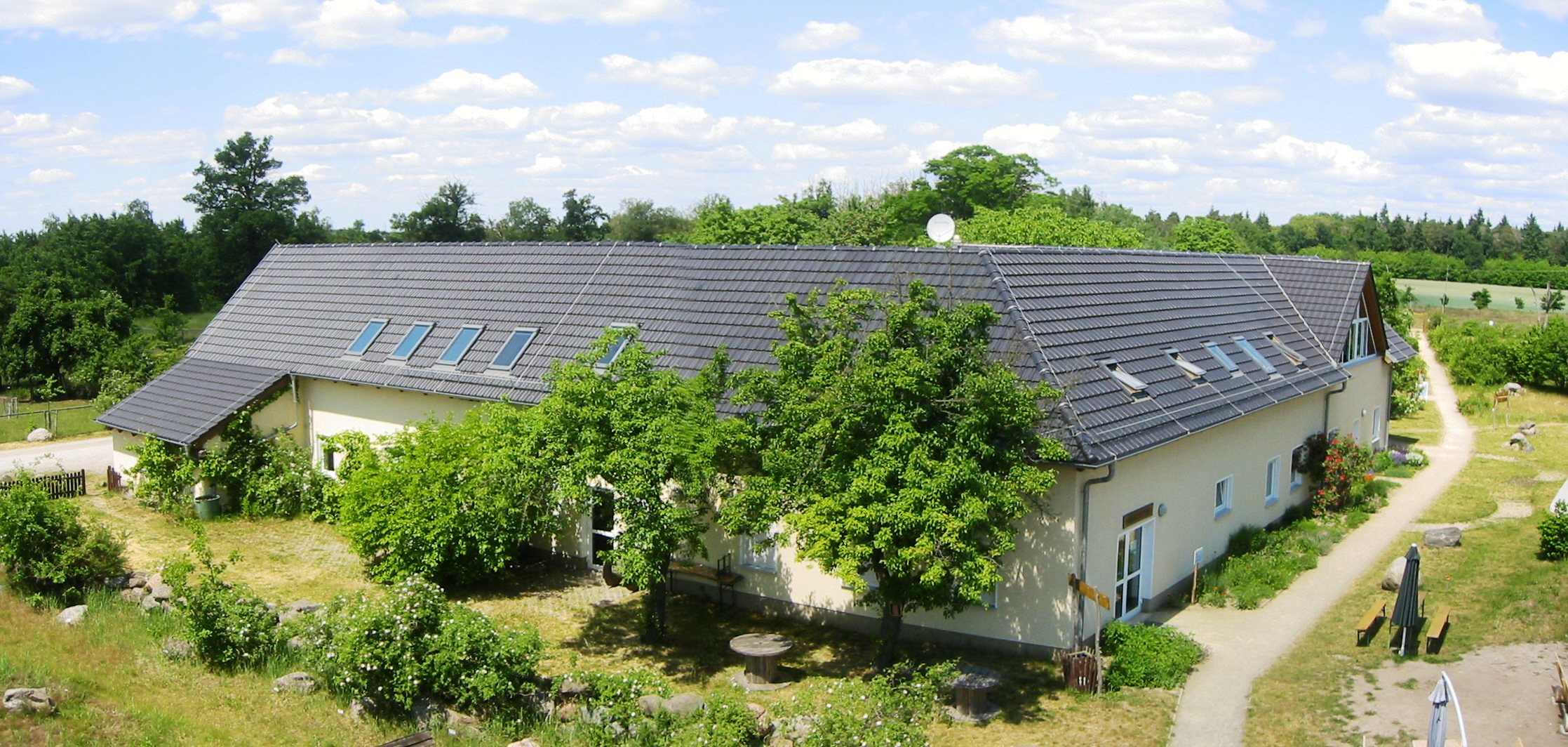 Hauptgebäude der Sielmanns Naturlandschaft Wanninchen mit Ausstellungen und Café, aufgenommen vom großen Aussichtsturm des Geländes